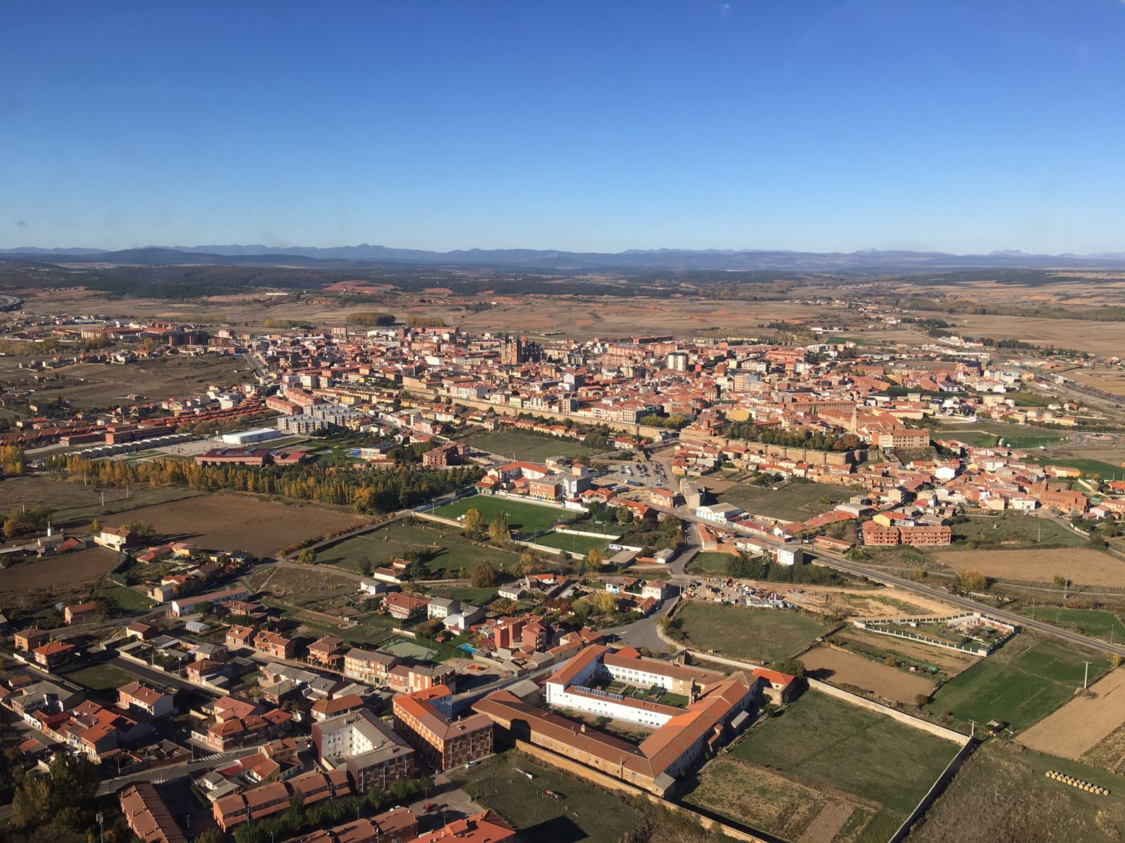 Fotografía aérea de Astorga (León, España).